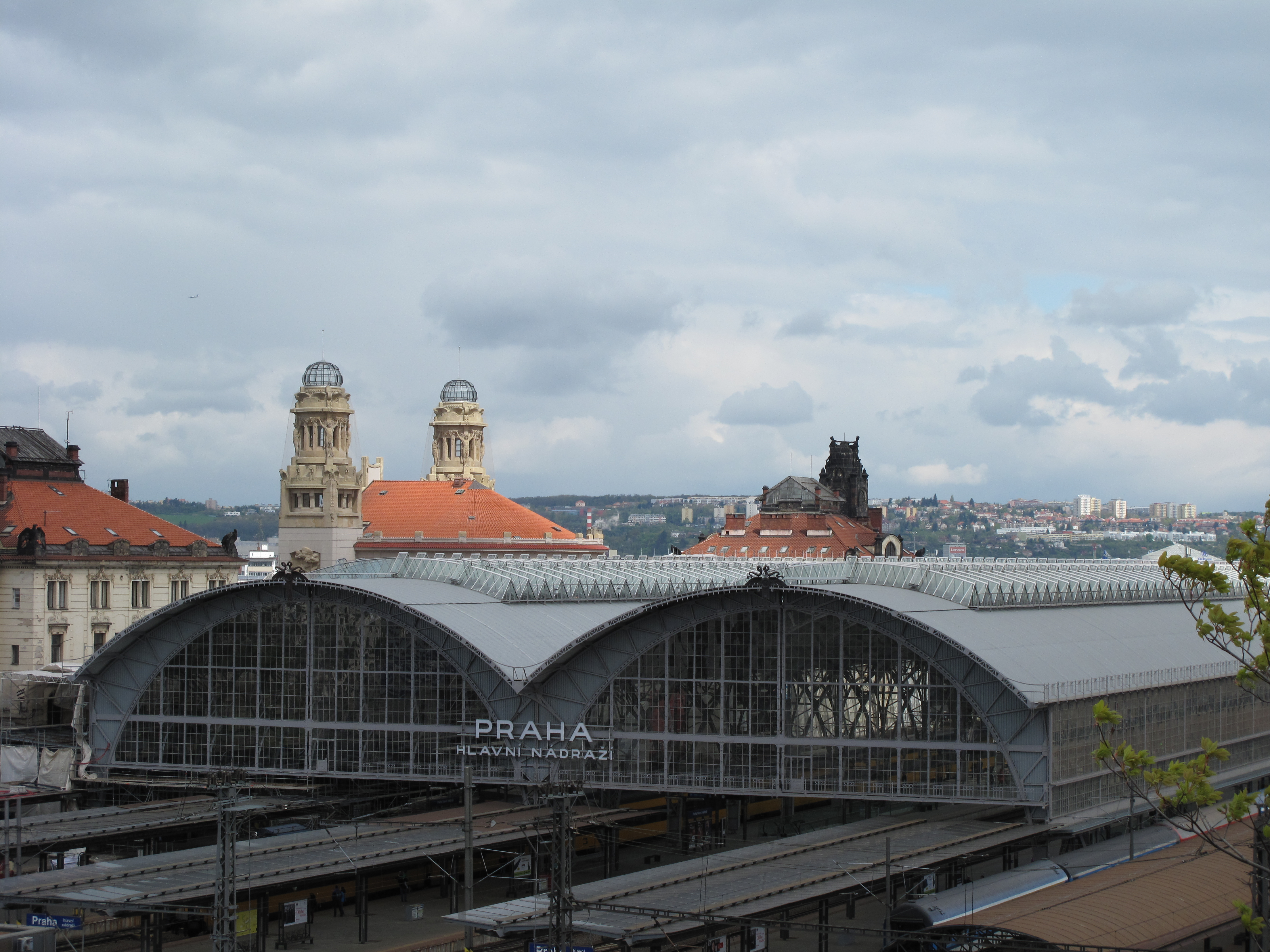 Hlavní nádraží v Praze, Česká republika.